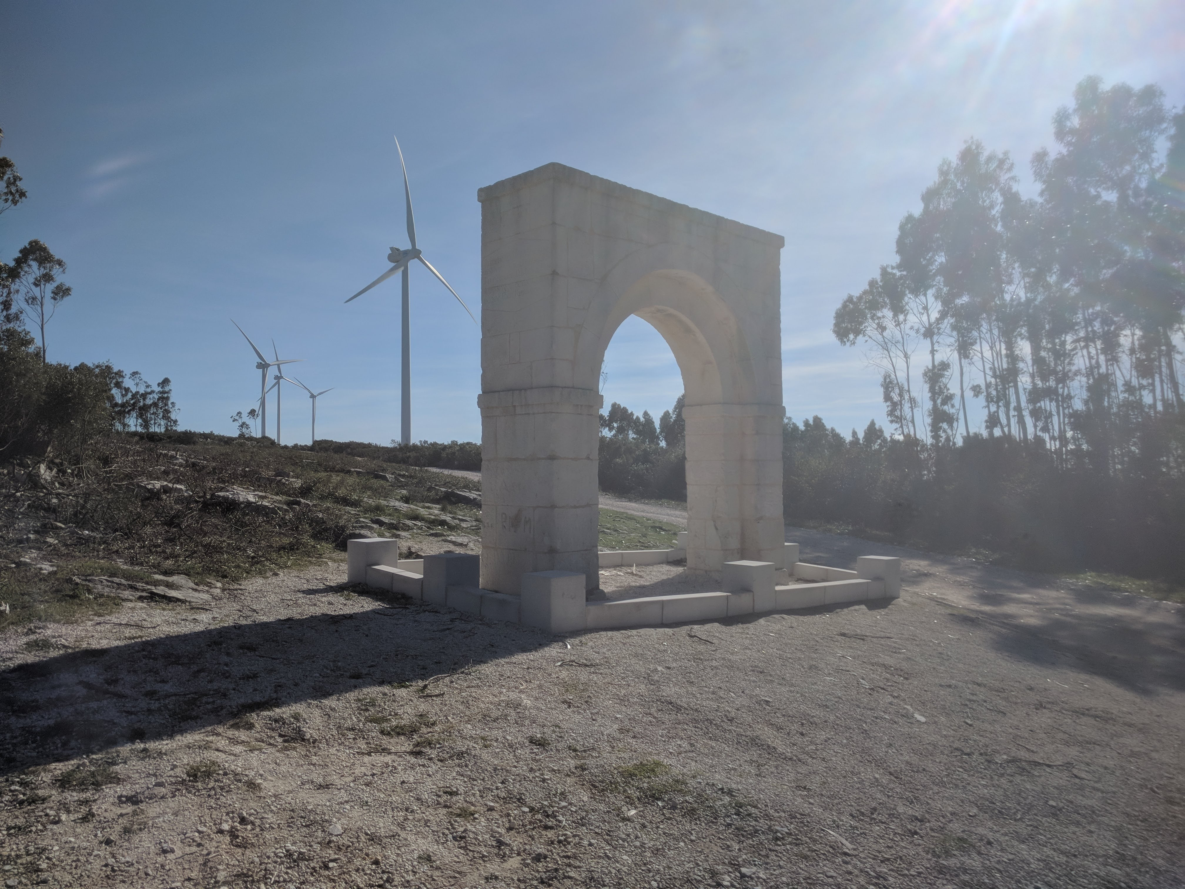 Foto do Arco da Memoria na sua totalidade.